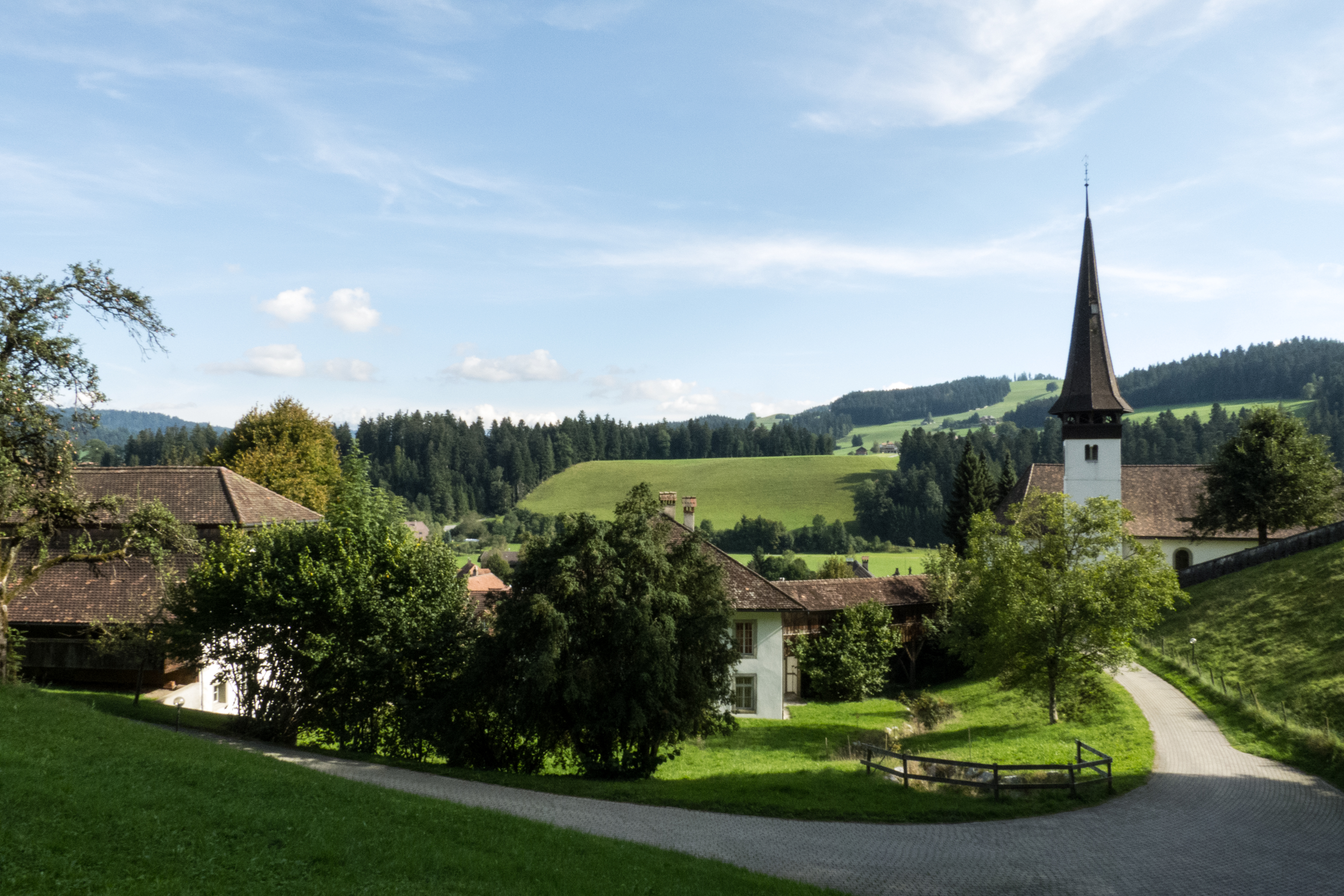 Reformierte Kirche Signau mit gedeckter Holzbrücke zum Pfarrhaus